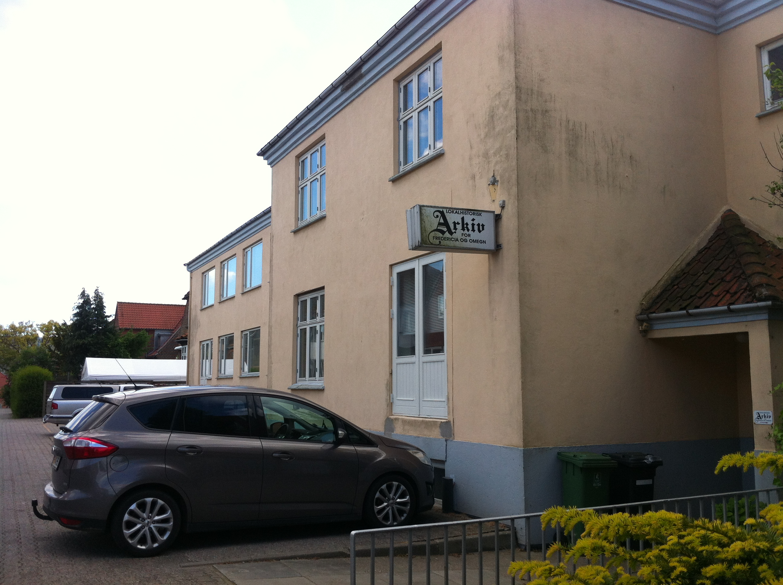 Fredericia Lokalhistorisk Arkiv, 4. juni 2014